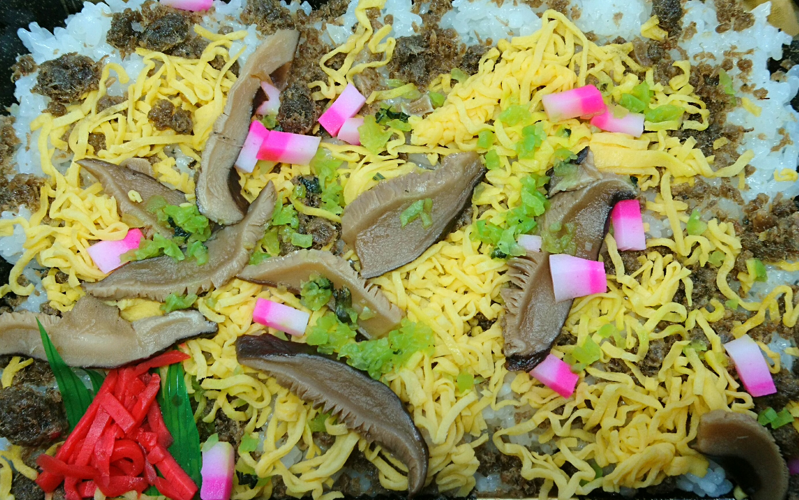 丹後地方の郷土料理。がんぎ（板蒲鉾）を用いたばらずしの一例。